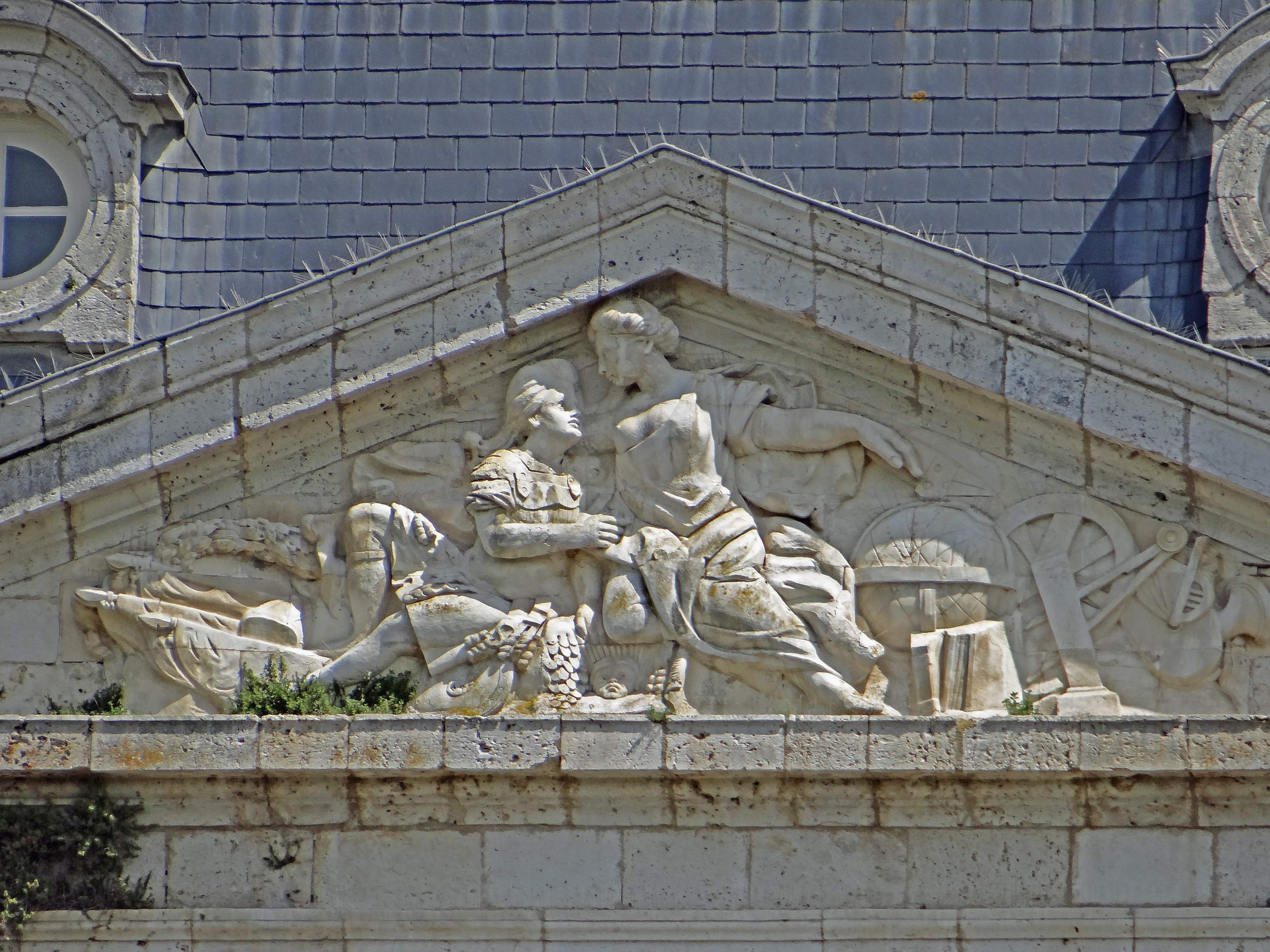 Château d'Aiguillon - Sculpture du fronton, côté ouest